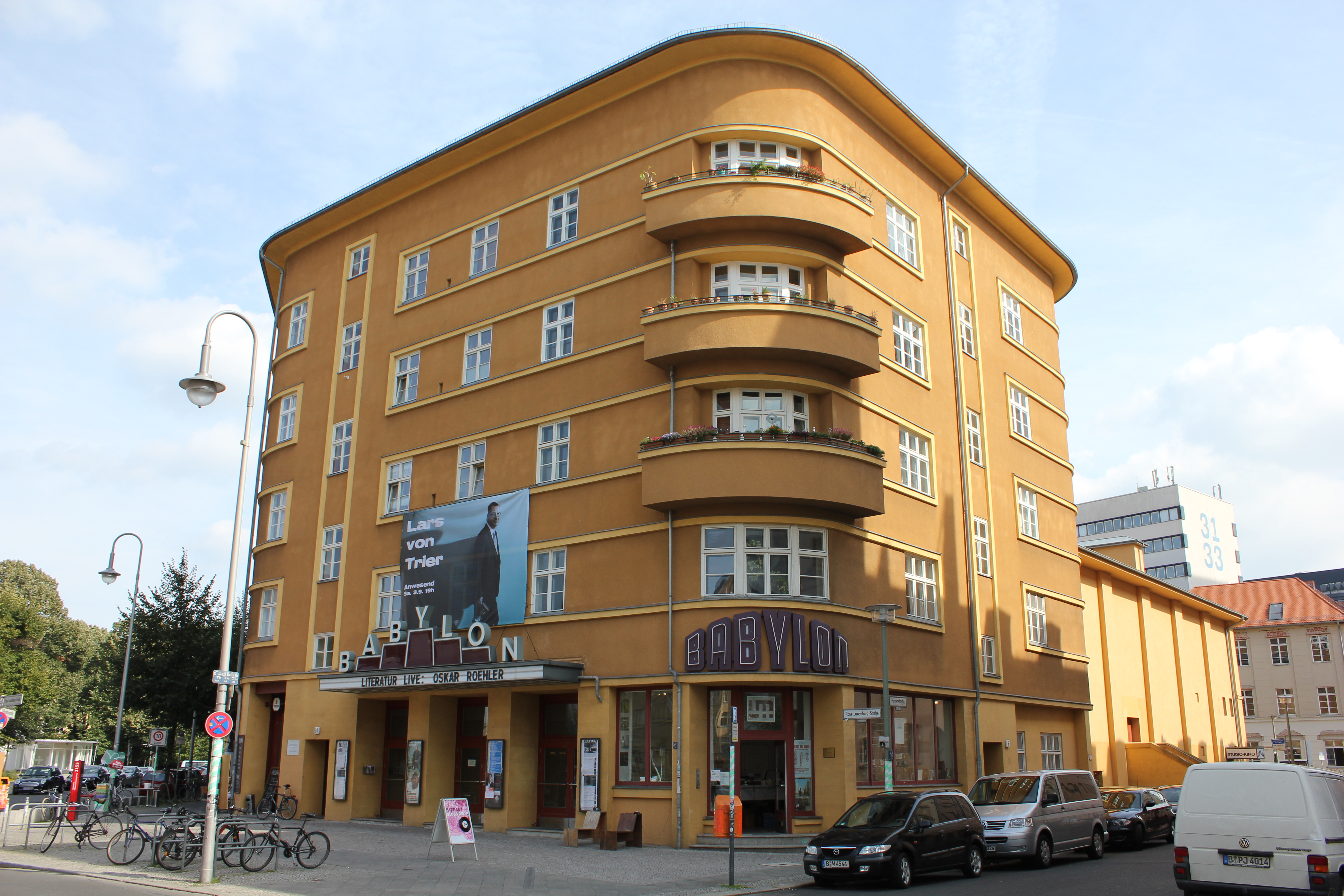 stilvolles Kino in Berlin